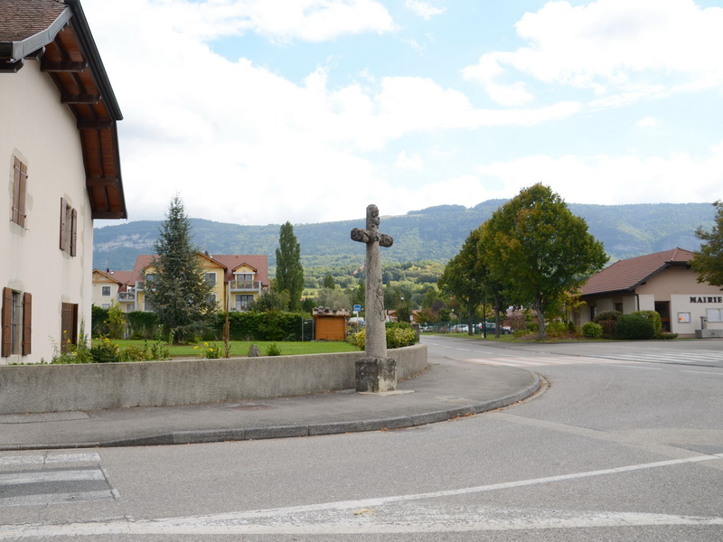 Croix de Verrières à Neydens - Vue d'ensemble